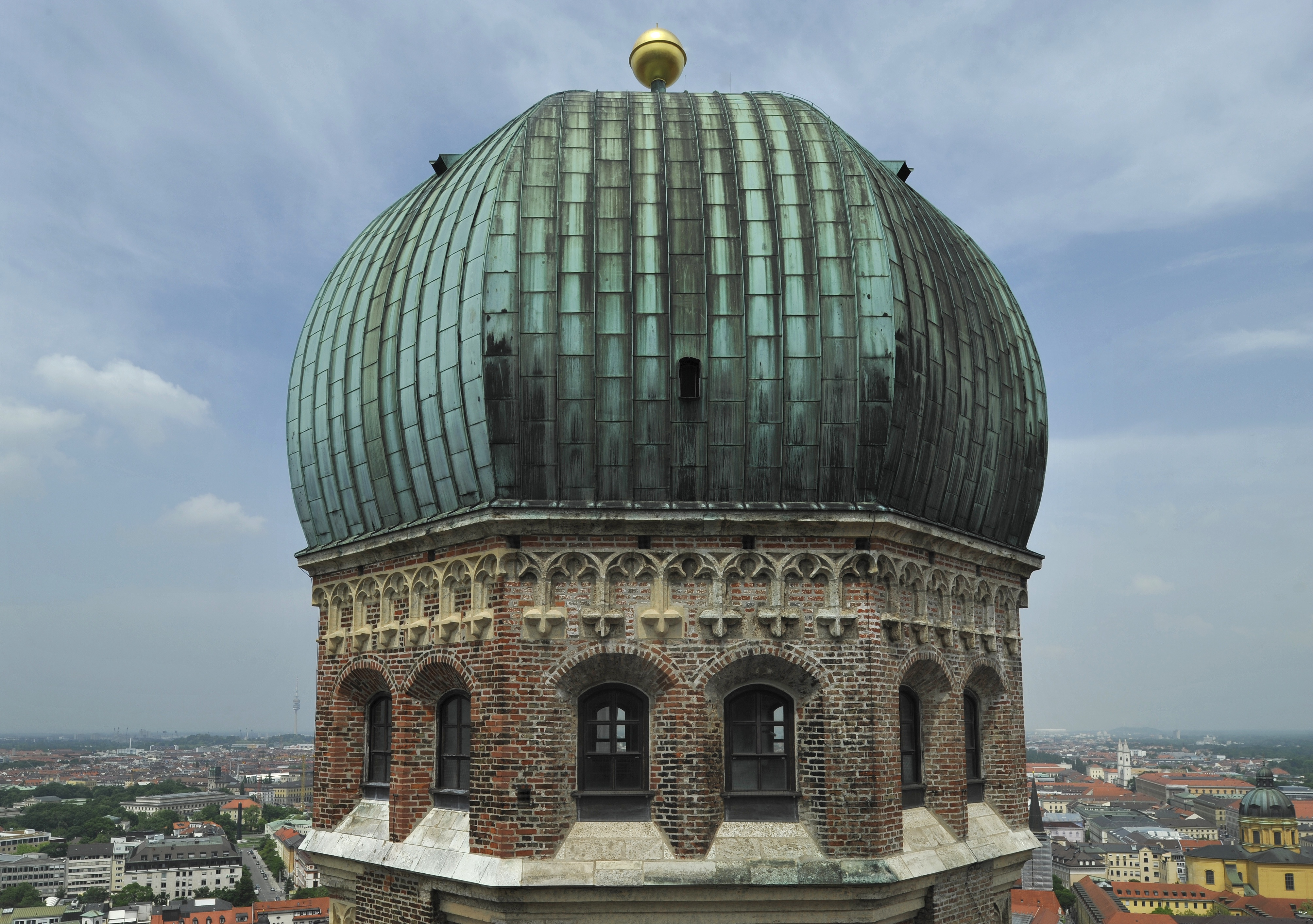 München, Frauenkirche Domkuppel. Aufgenommen im Jahr 2008 von der Turmstube. Die Domkuppel wurde in der Wiederaufbauzeit nach dem zweiten Weltkrieg von der Bauunternehmung Georg Berlinger in Stahlbeton nachrekonstruiert. Die Baufirma Brannekämper war für die andere Turmkappe verantwortlich. Die nördliche Kuppel wurde von der Firma Schäffler eingedeckt. Der Turmknauf wurde von der Kupferschmiede Georg Neidhart neu hergestellt.